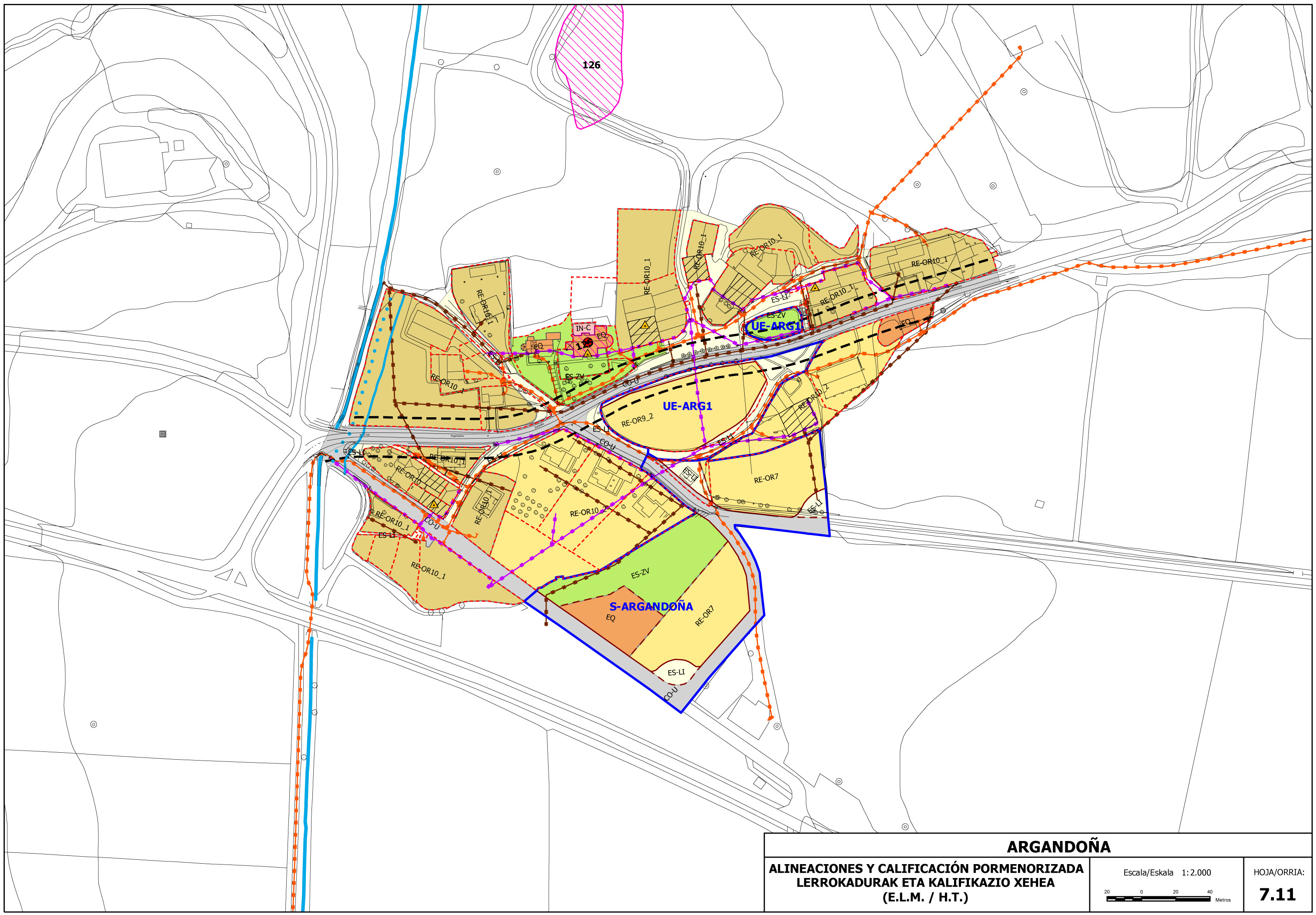 Argandoña, Gasteiz, 2007-12-31.